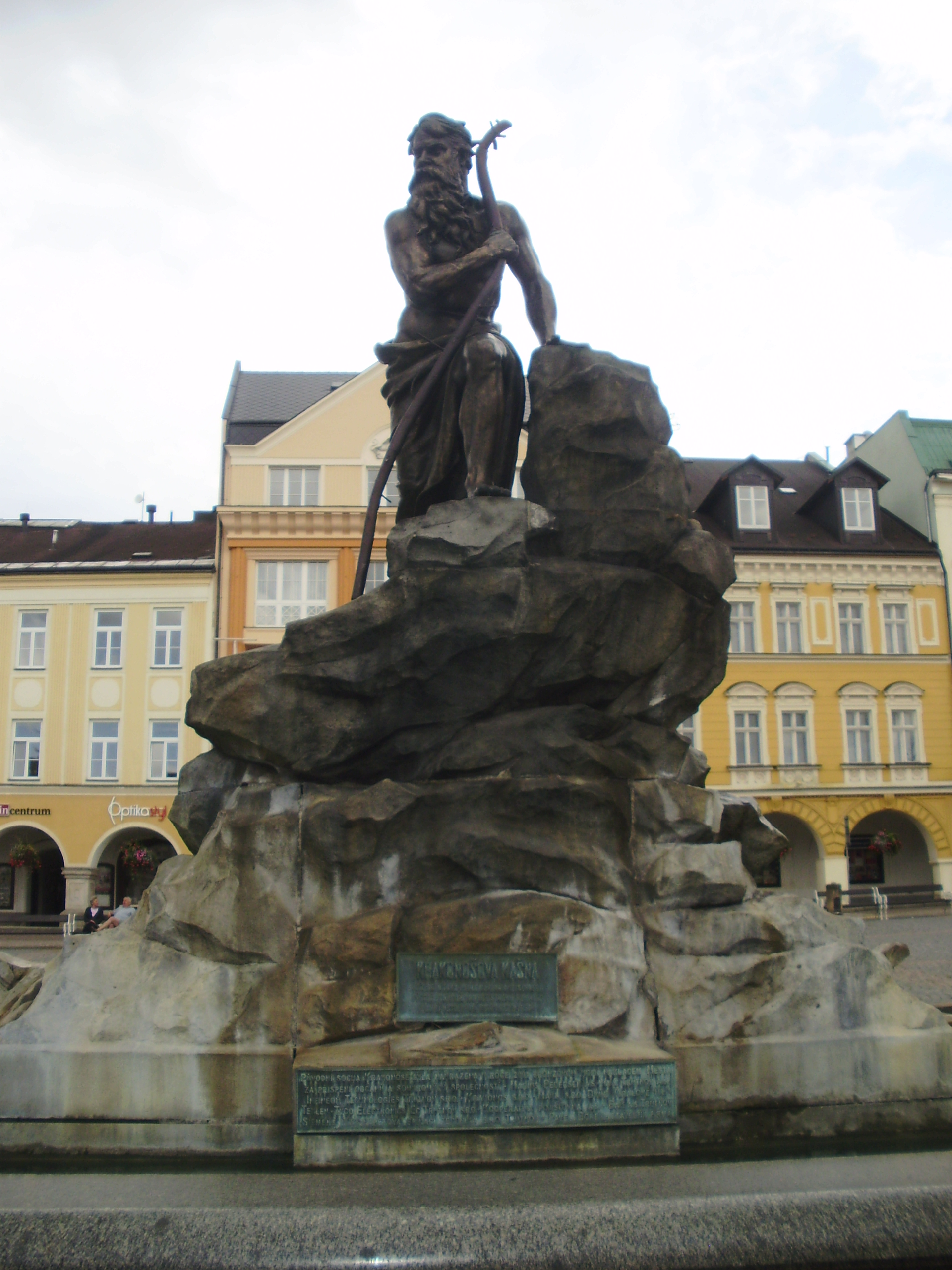 Kašna Krakonošova (Trutnov), Krakonošovo nám., Trutnov